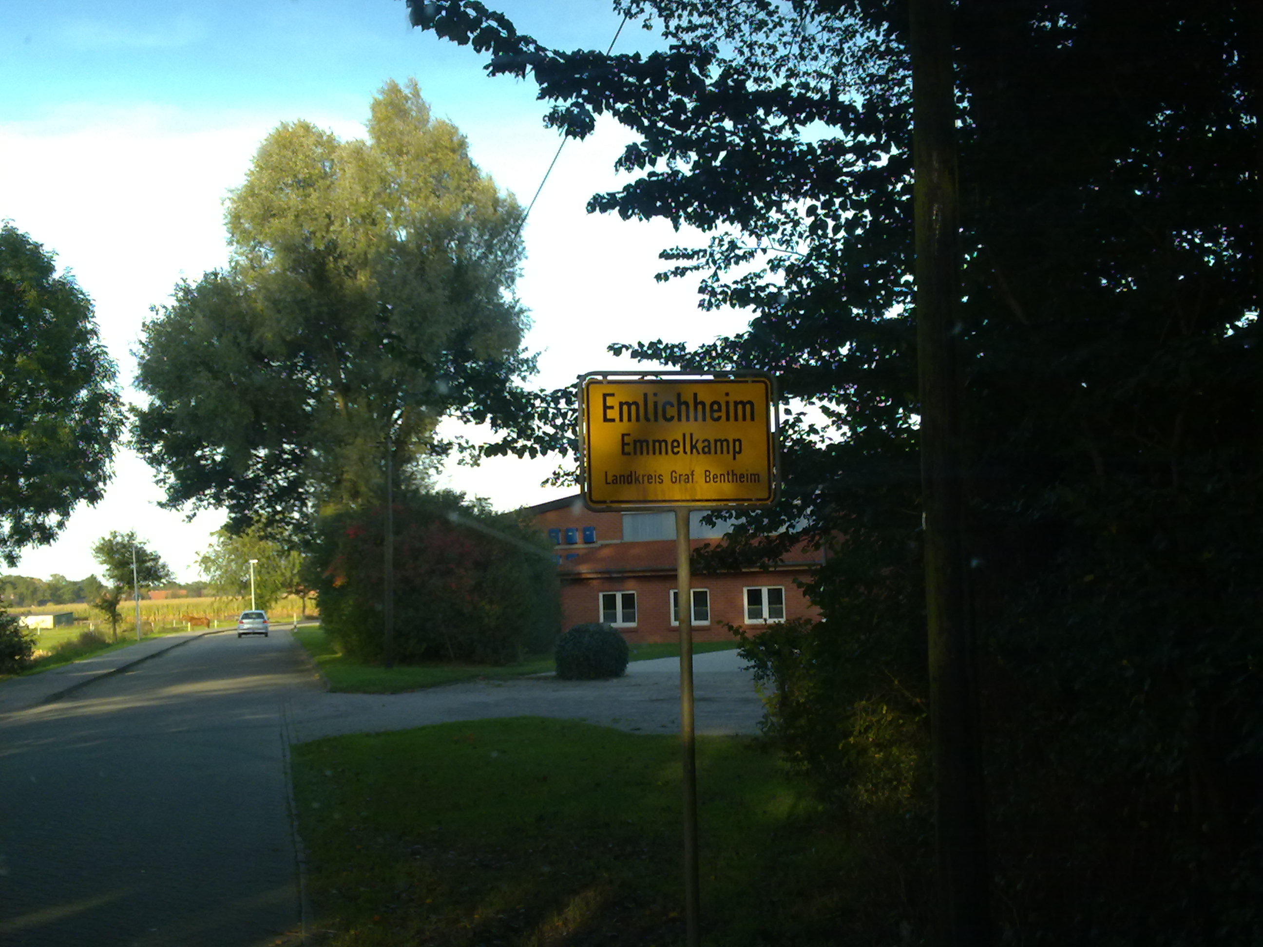 Deutsch/niederdeutsches Ortsschild in Emlichheim (niederdeutsch Emmelkamp)